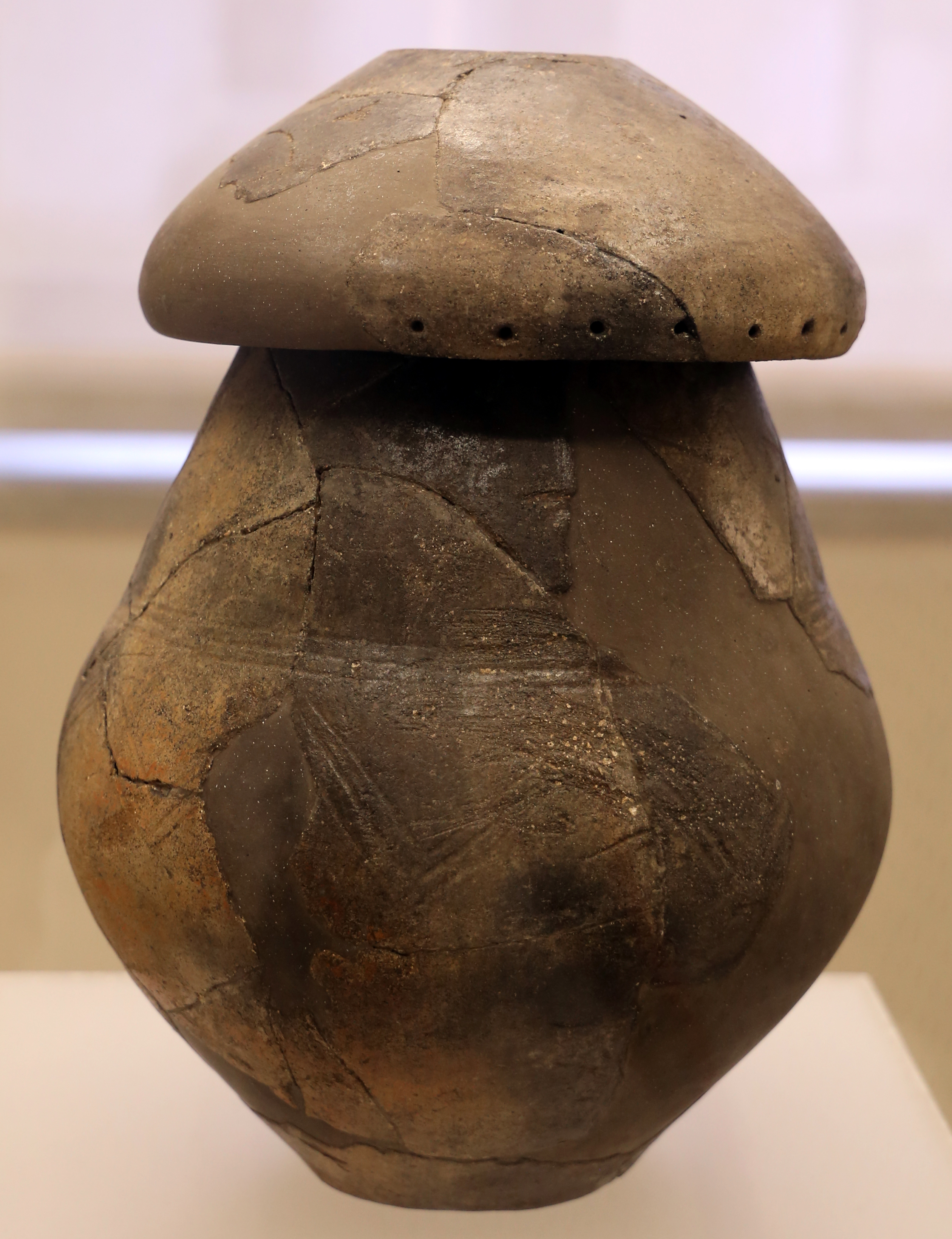 Villa Giulia (Rome) This is a photo of a monument which is part of cultural heritage of Italy.